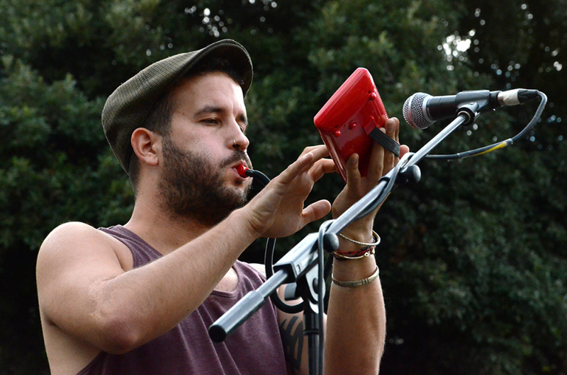 Concert d'Els Catarres. La Via Catalana a Barcelona. Plaça Catalunya.